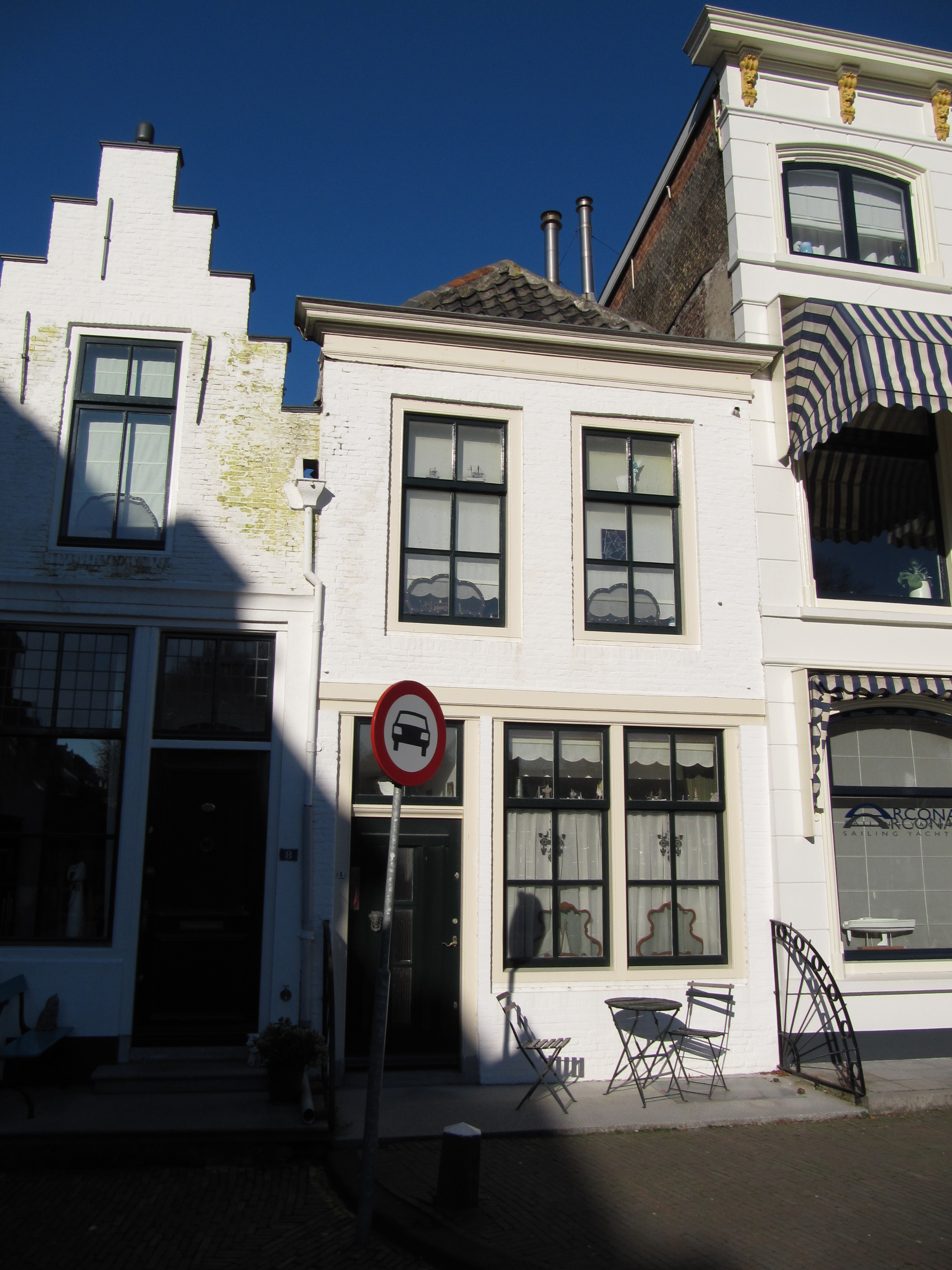 RM40674 Zierikzee - Kraanplein 6.jpg